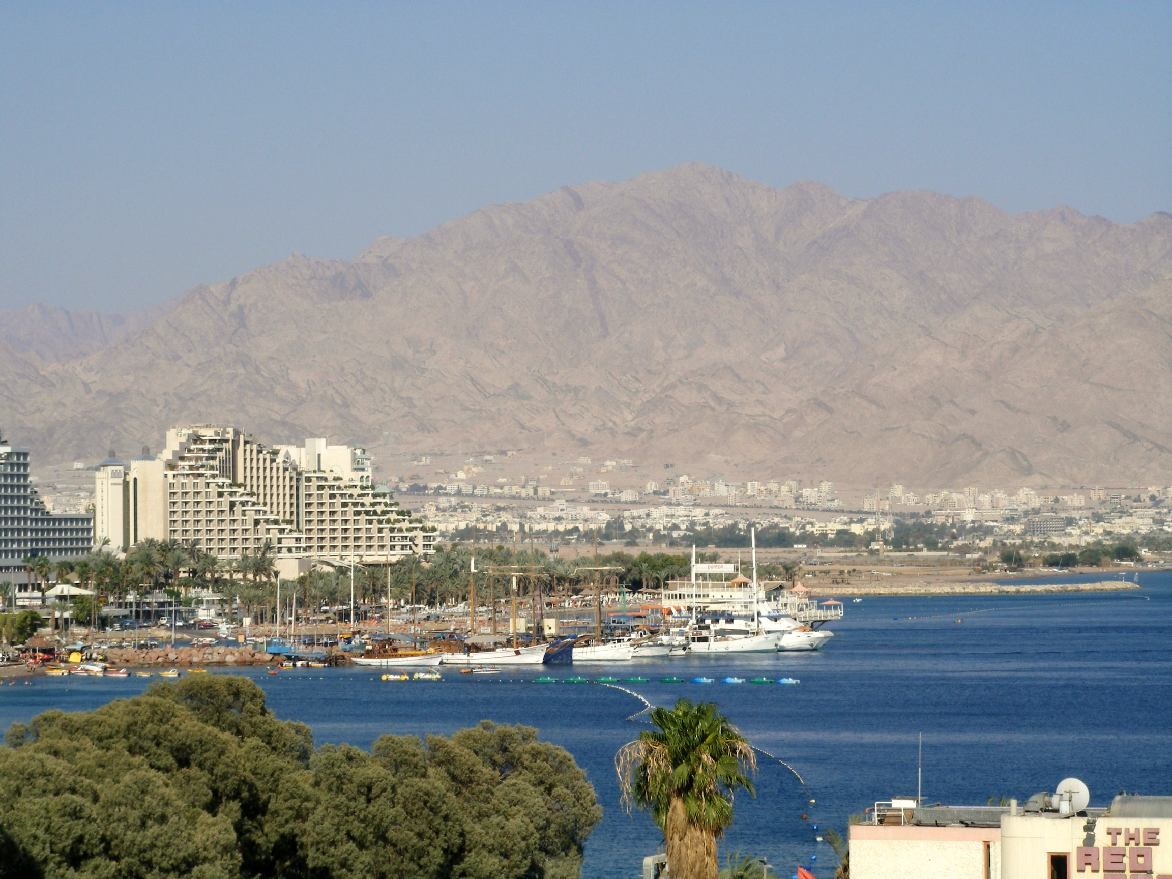 Eilat, Israel, Panorama